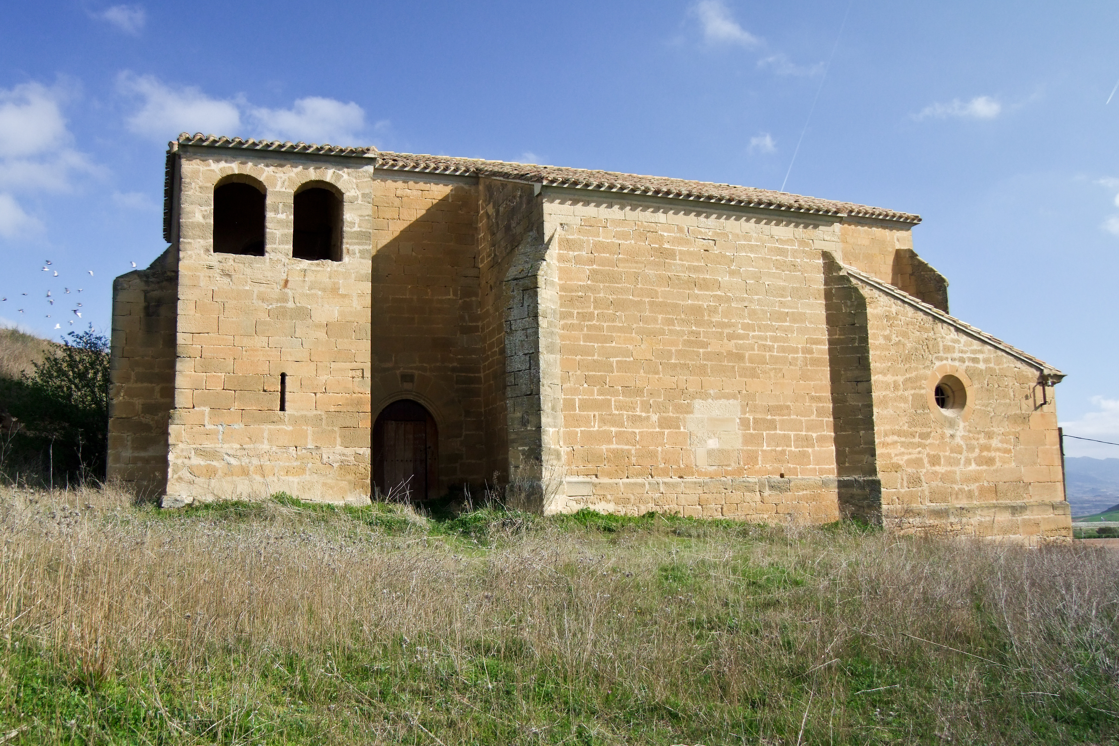 Ermita de San Martín en el término de Cuzcurritilla, Rodezno -La Rioja - España